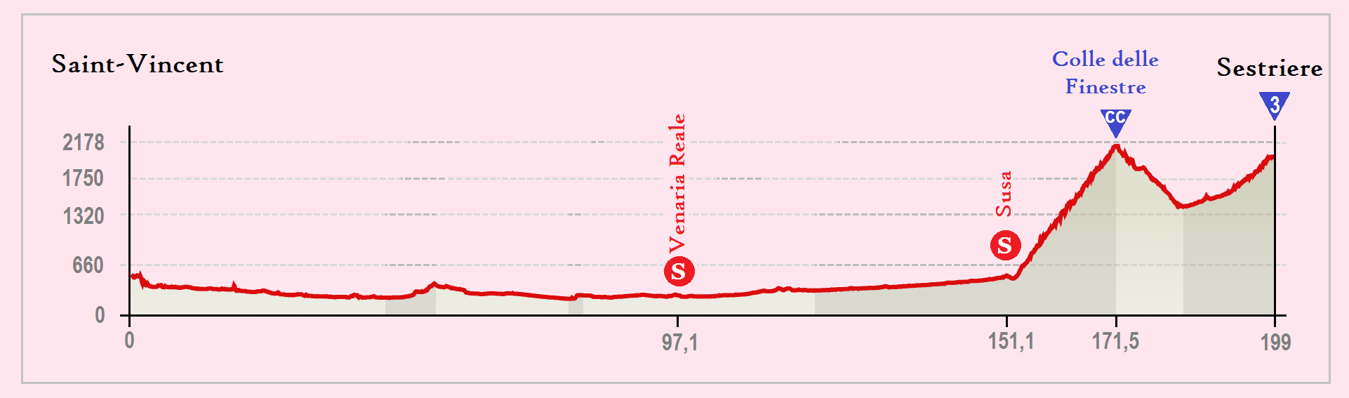 Perfil de la 20.ª etapa del Giro de Italia 2015